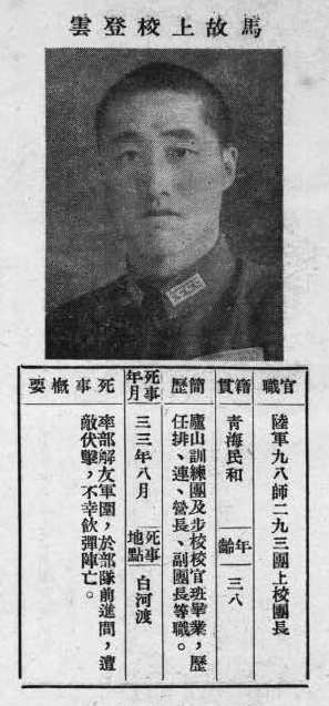 抗戰軍人忠烈錄第一輯中的烈士遺像